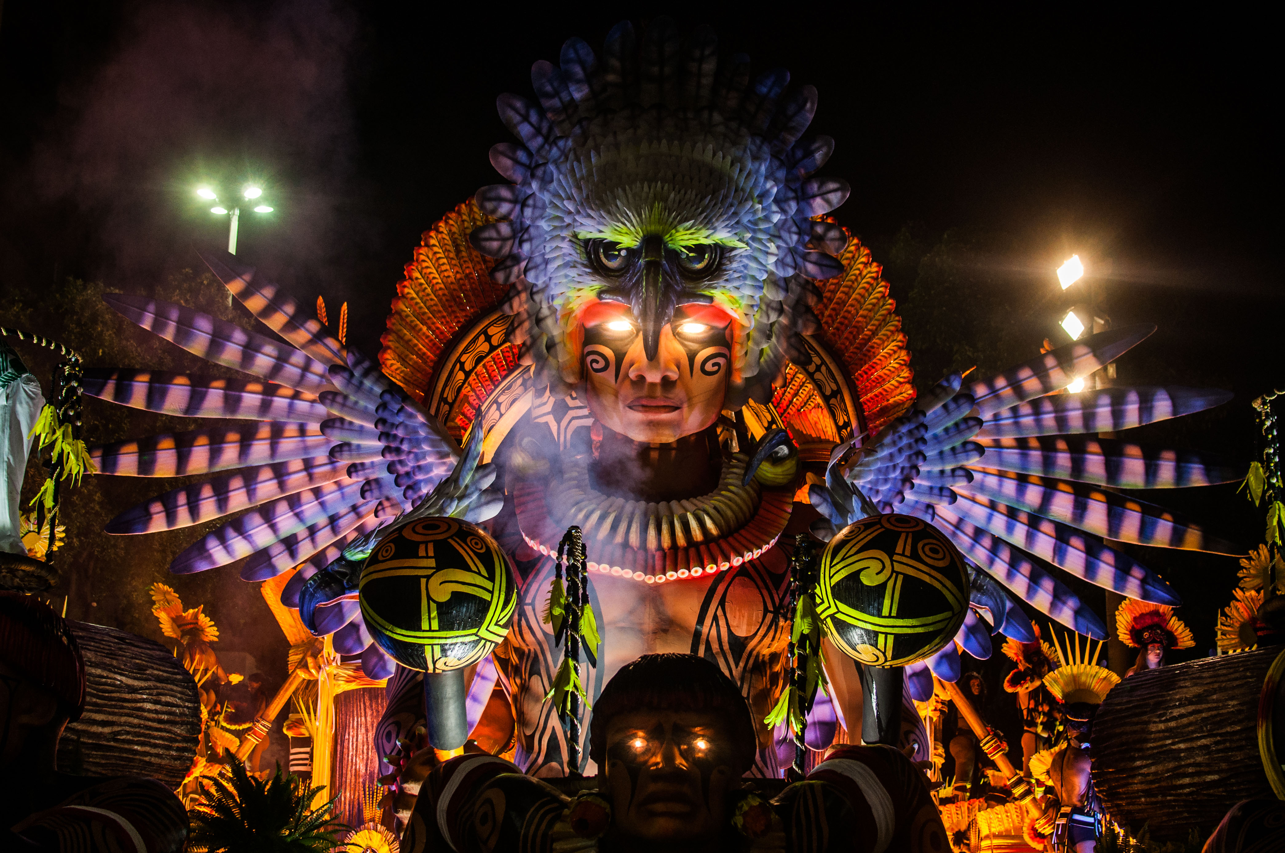 Escuelas de Samba se prensentan en la tradicional presentación de carros y desfile en el Sambódromo; fotos: Juan Hoppe / Otros Carnavales